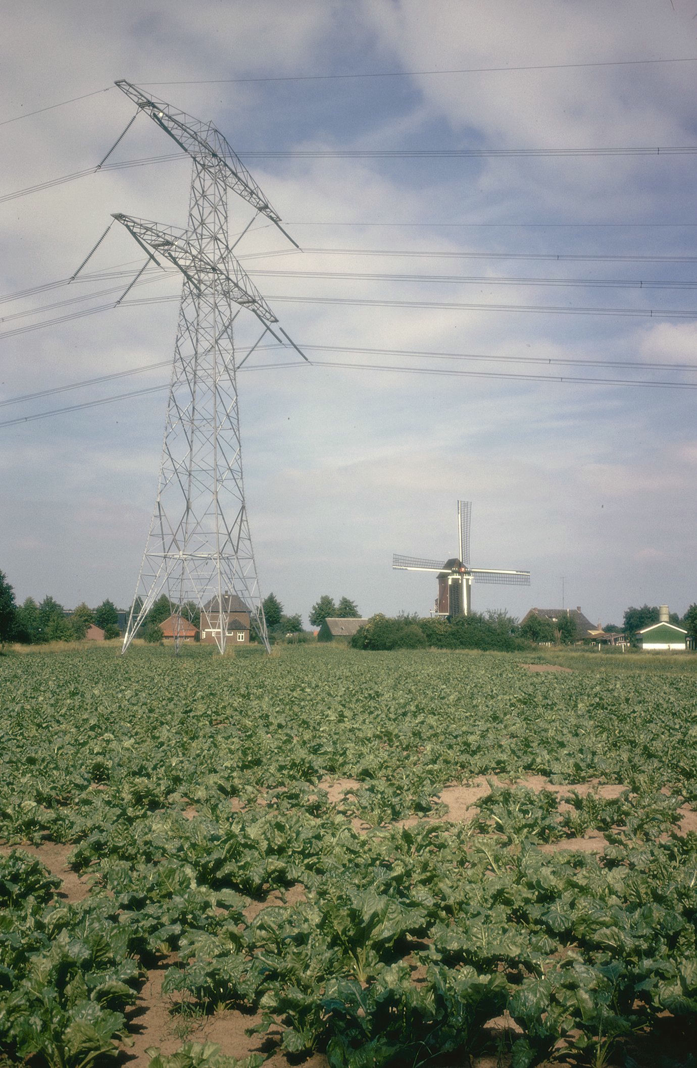 Sint Lindert: Akker met hoogspanningsmast (380 kV hoogspanningslijn Maasbracht-Dodewaard, mast no. 13) en op de achtergrond de standerdmolen